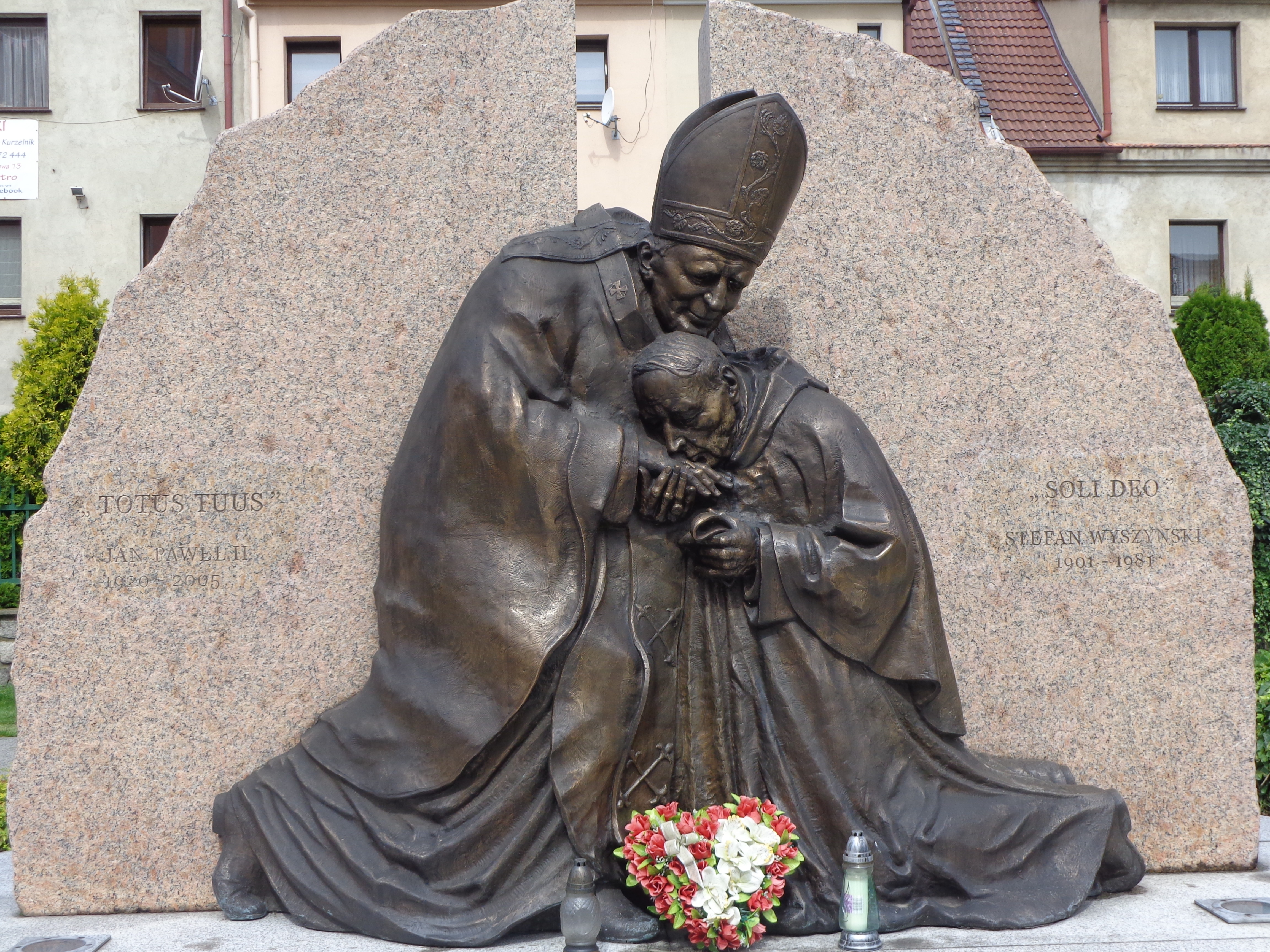 Pomnik papieża Jana Pawła II i Stefana Wyszyńskiego na Placu Farnym w Prudniku.